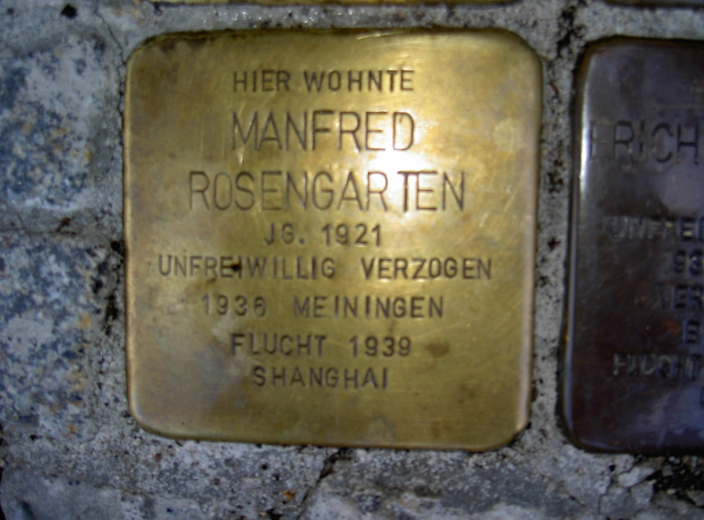 Stolperstein in Themar Rosengarten Manfred